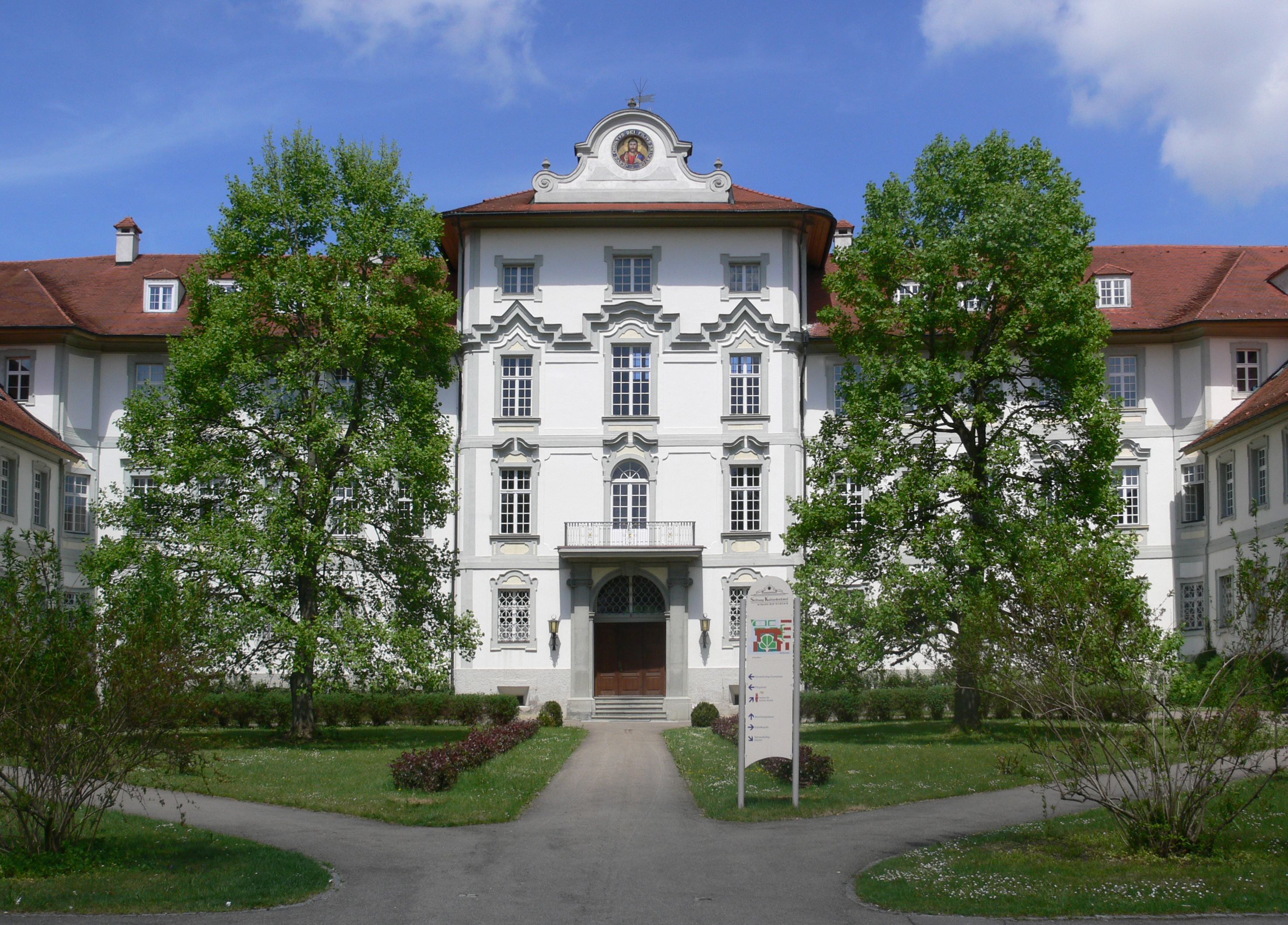 Schloss Wurzach, Bad Wurzach, Baden-Württemberg Hauptfassade